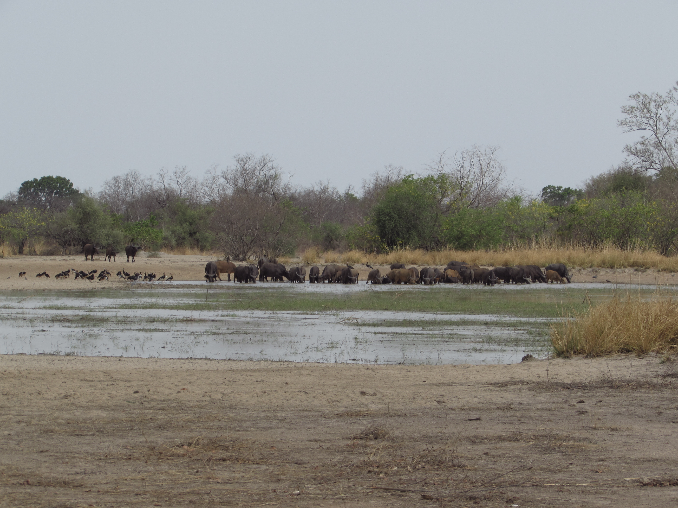 nationalpark pendjari - büffel am mare bali